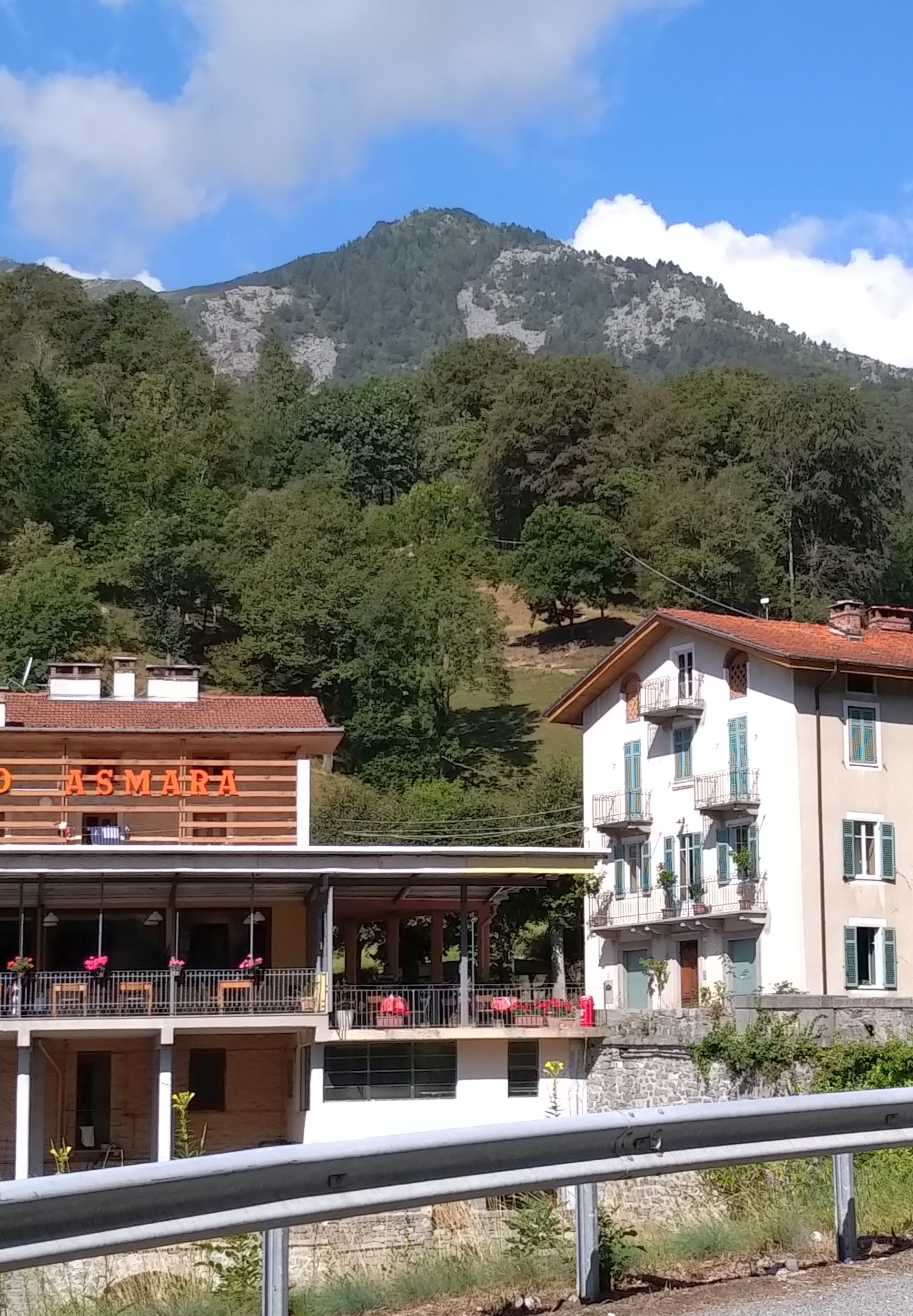 Il Monte Massaro (Alpi Biellesi) visto dall'Asmara